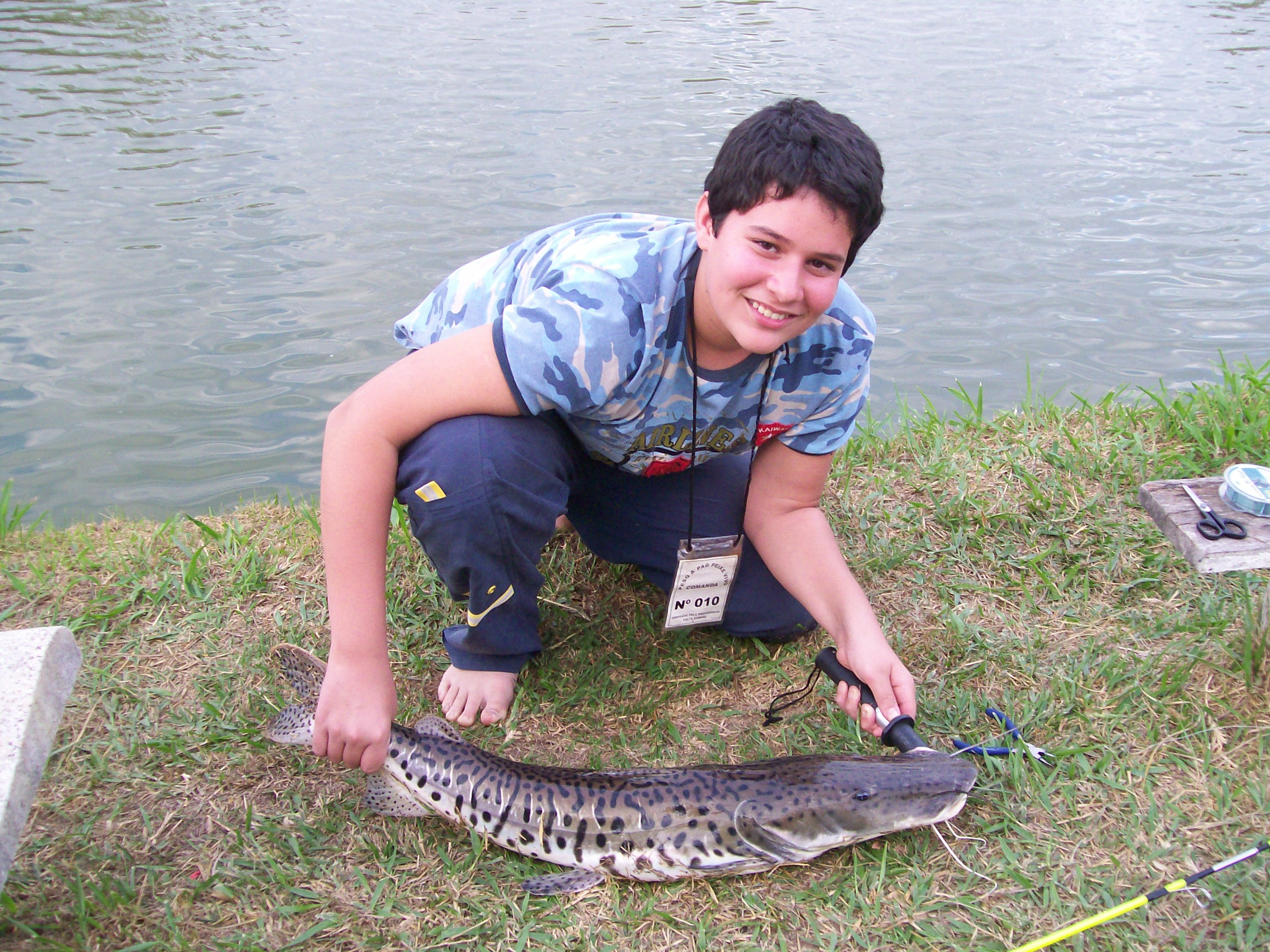 Pincachara fisgada com salsicha e solta após as fotos